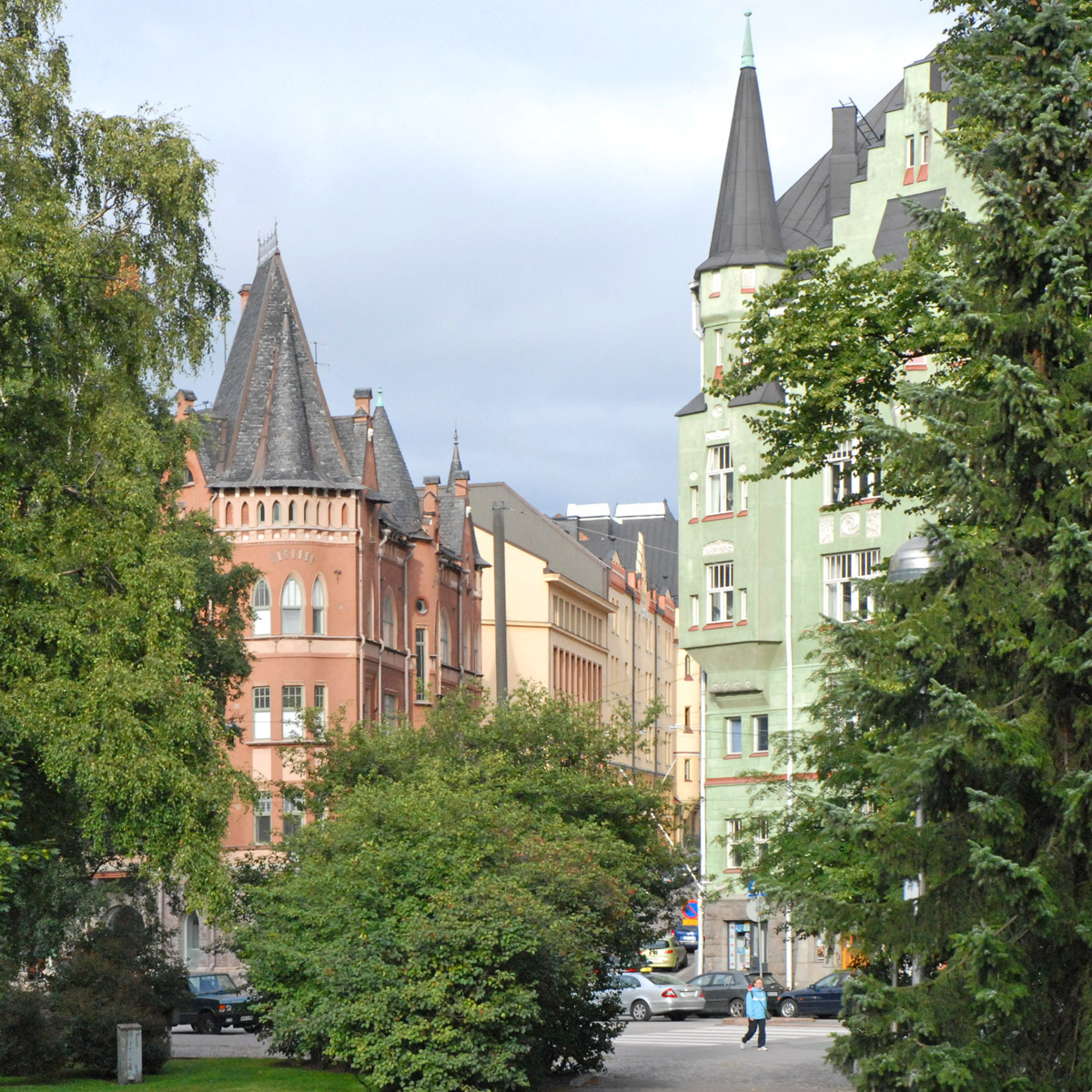 Immeubles art nouveau (Jugendstil, Jugend) à l'entrée de la rue Luotsikatu à Helsinki, construits entre 1897 et 1903. Le quartier de Katajanokka (Skatudden) sépare les parties nord et sud du port d'Helsinki. Dans sa partie la plus ancienne, ce quartier possède des ensembles très homogènes d'habitations construites au début du 20ème siècle dans un style "art nouveau" finlandais (Jugendstil, Jugend) c'est à dire teinté de romantisme national.